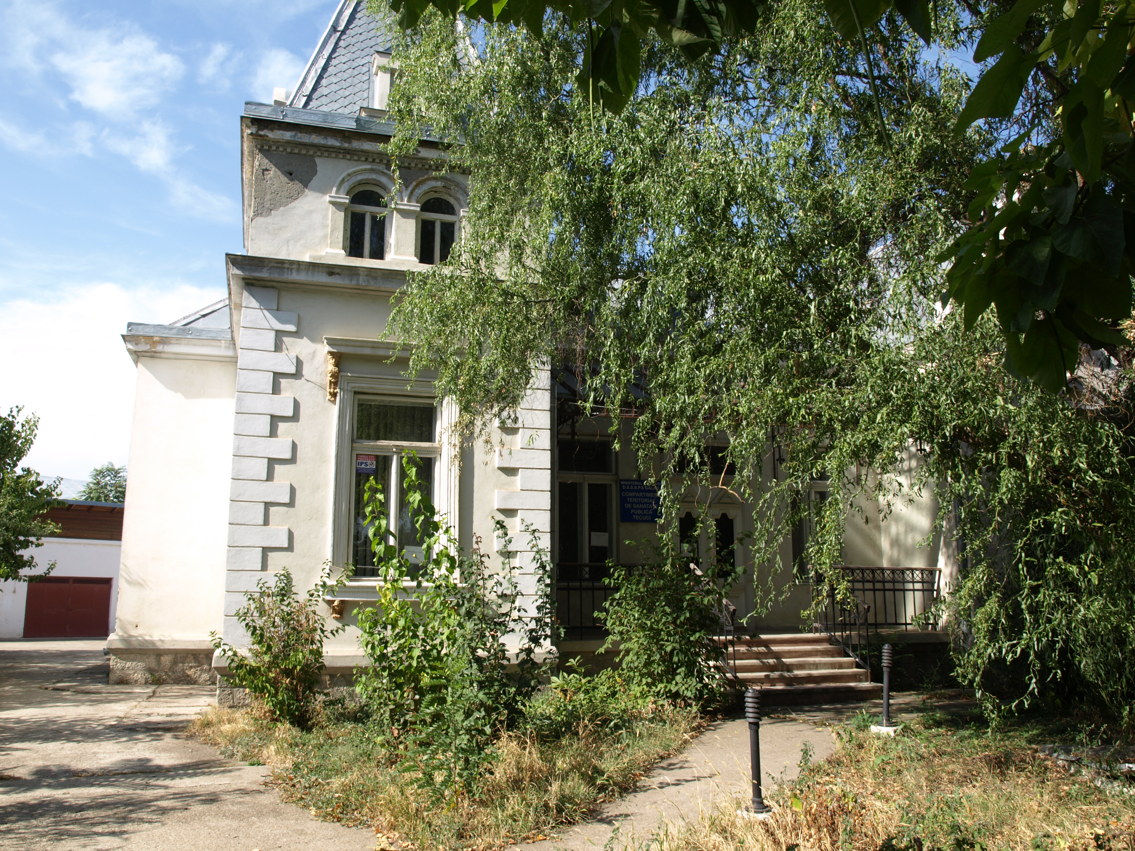 Casa colonel Popescu